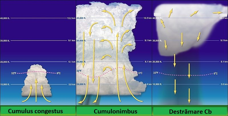 Formare Cumulonimbus